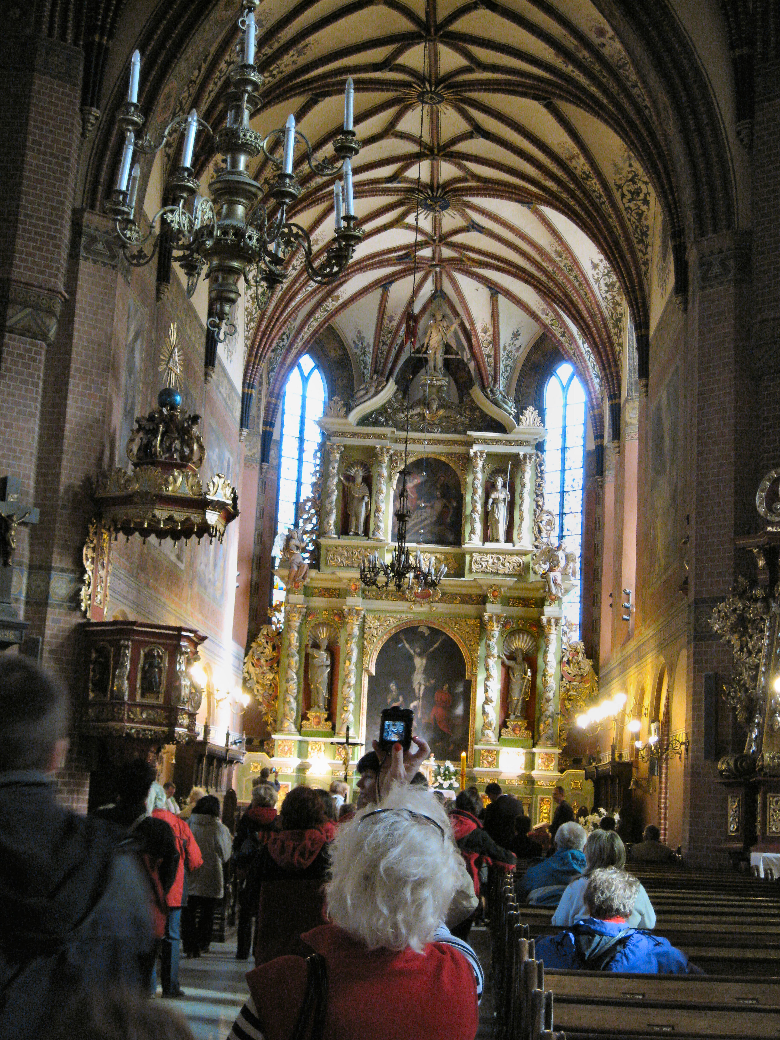 kościół parafialny p.w. Podwyższenia Krzyża Św. ul Kardynała Wyszyńskiego ( d.1 Maja 32) 6 Tczew, Tczew